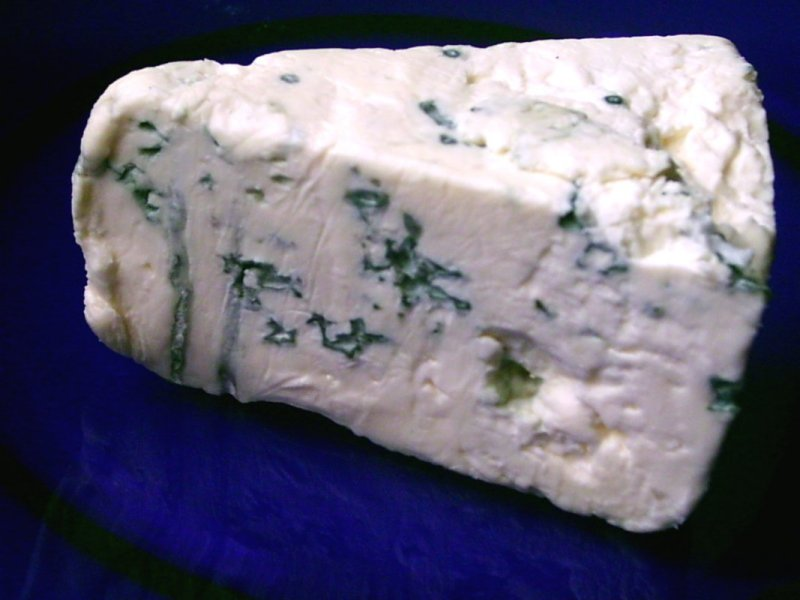 Bayerischer Blauschimmelkäse GNU-FDL selbst fotografiert 25.05.04 Dominik Hundhammer